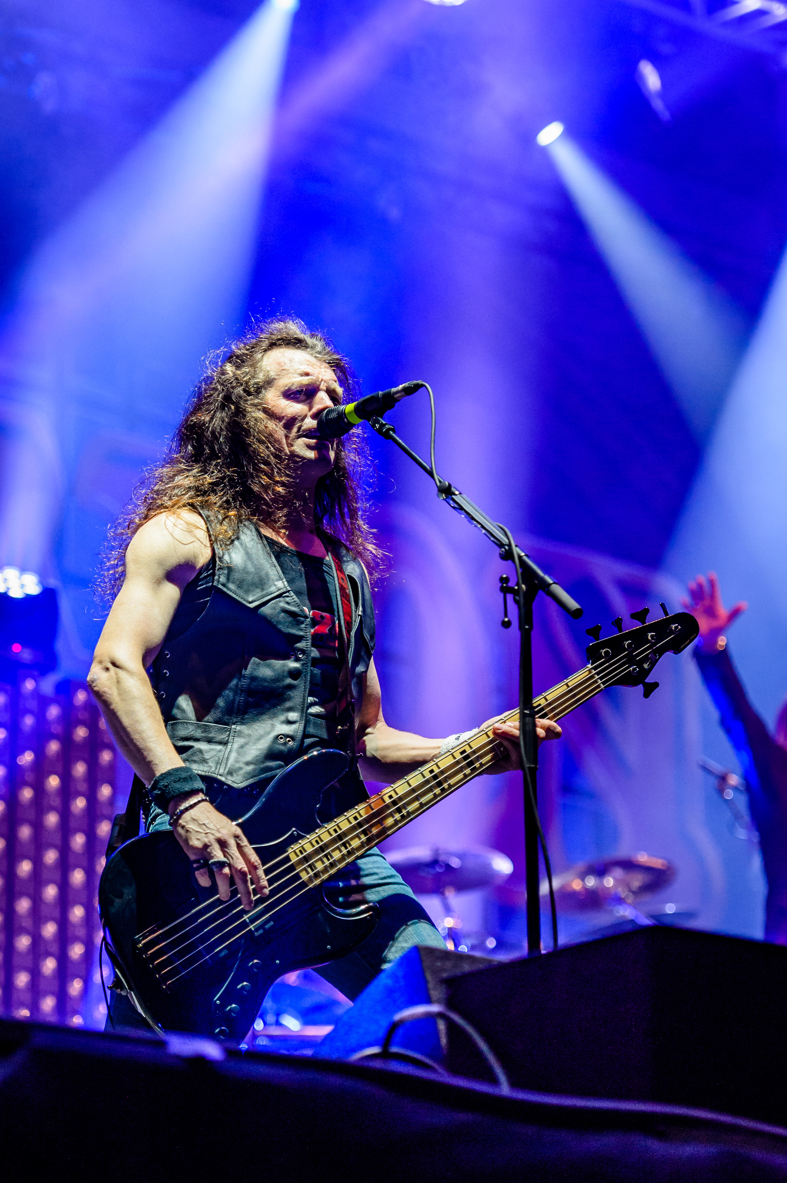 'RockHarz Open Air 2016; Ballenstedt': 'Saxon'